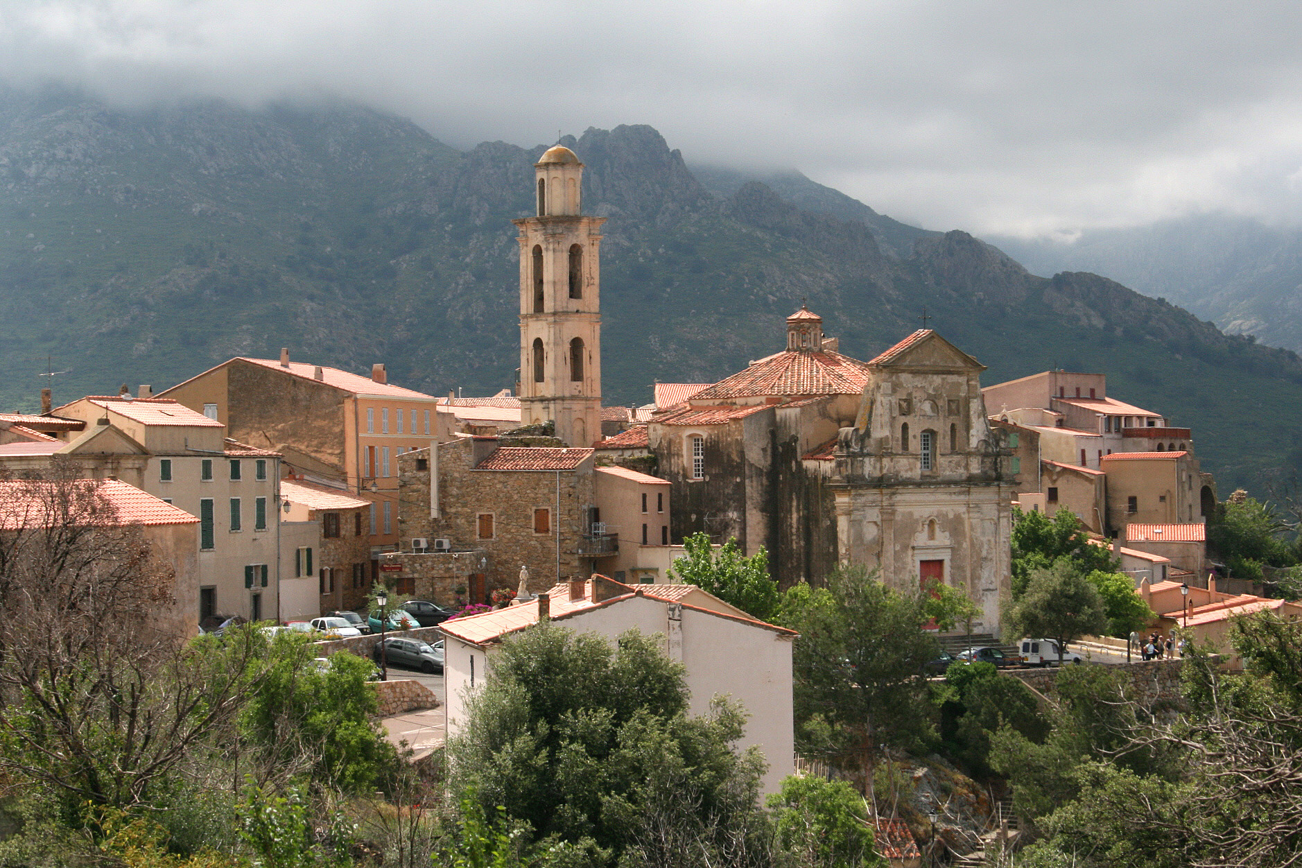 Montegrosso (Montemaggiore) - France - Corse du Sud, le village. Corsu: Montegrossu (Francia) - Corsica suprana, u paese.